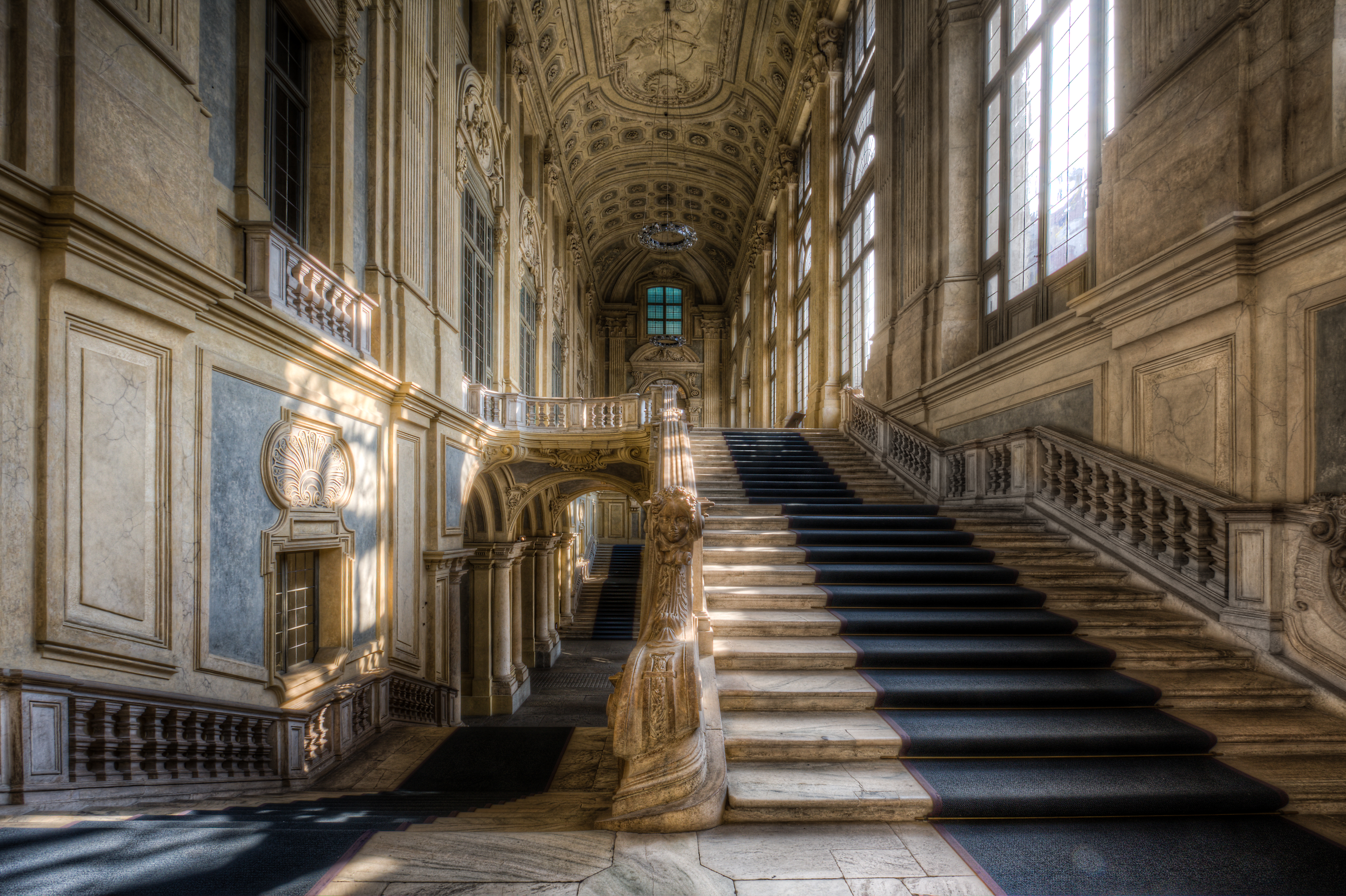 ID: 0012722849 This is a photo of a monument which is part of cultural heritage of Italy.